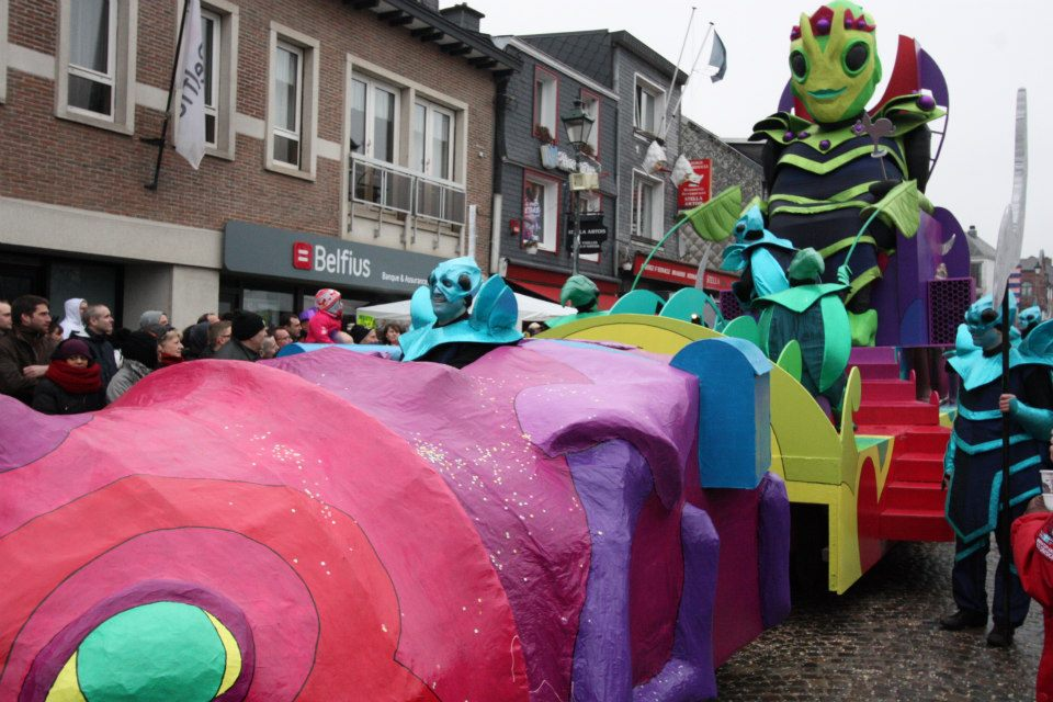 Char du groupe Vive La Fête - Laetare Stavelot 2013